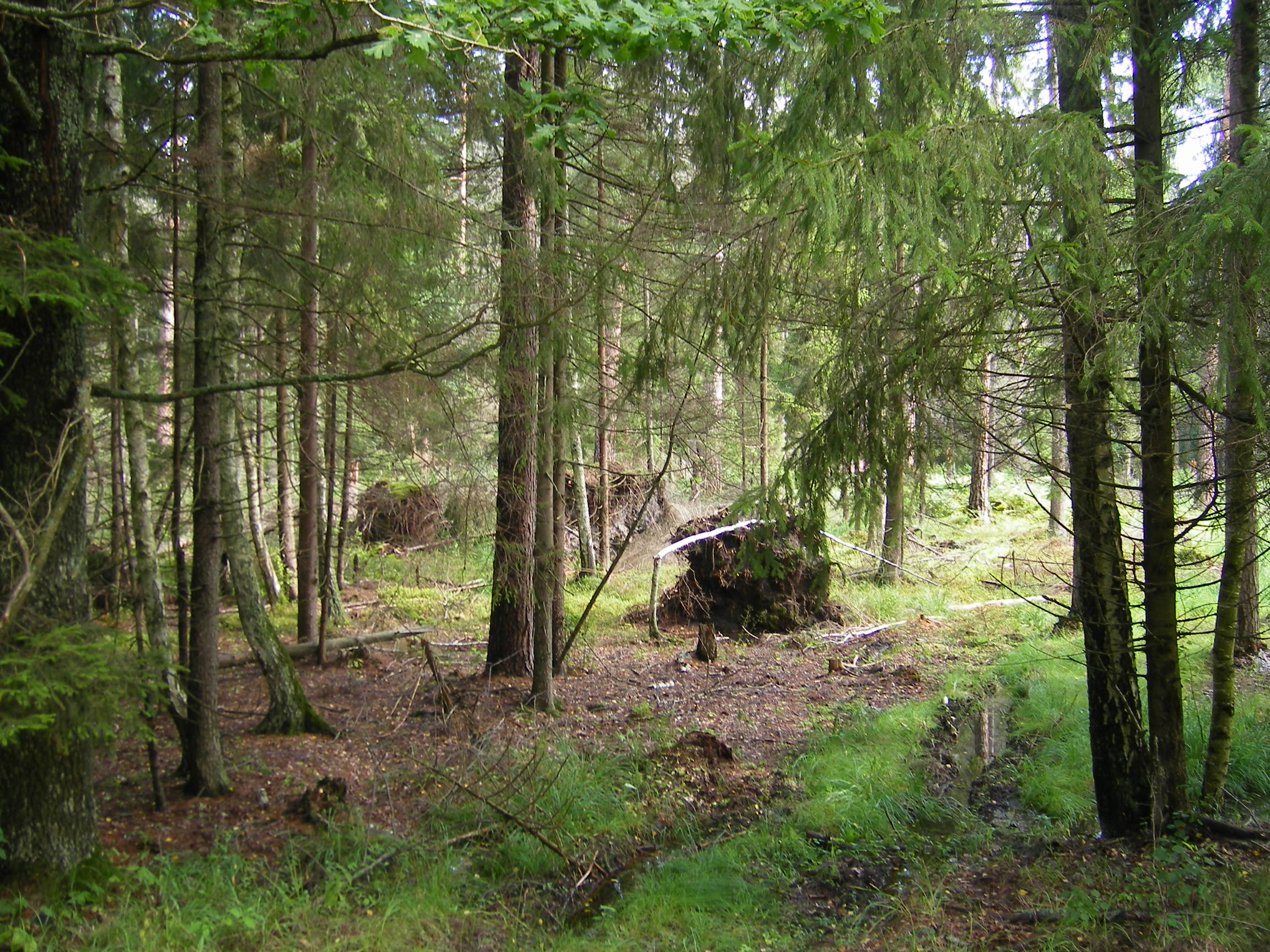 Belavezhskaya Pushcha, near Pererov